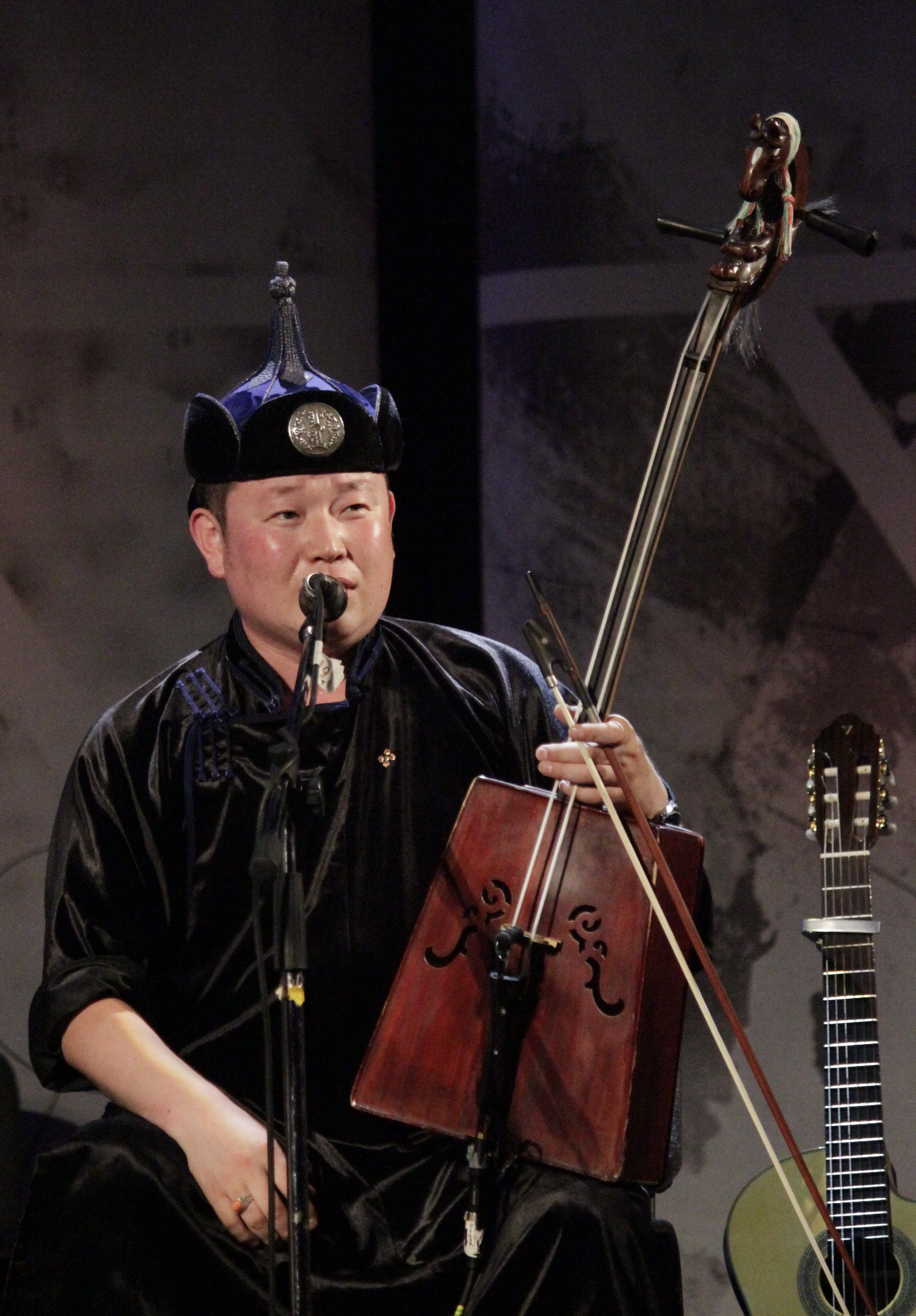 Anda Union (Mongolia) at the international music festival "Voice of nomads." Russia, Buryatia, July 2012